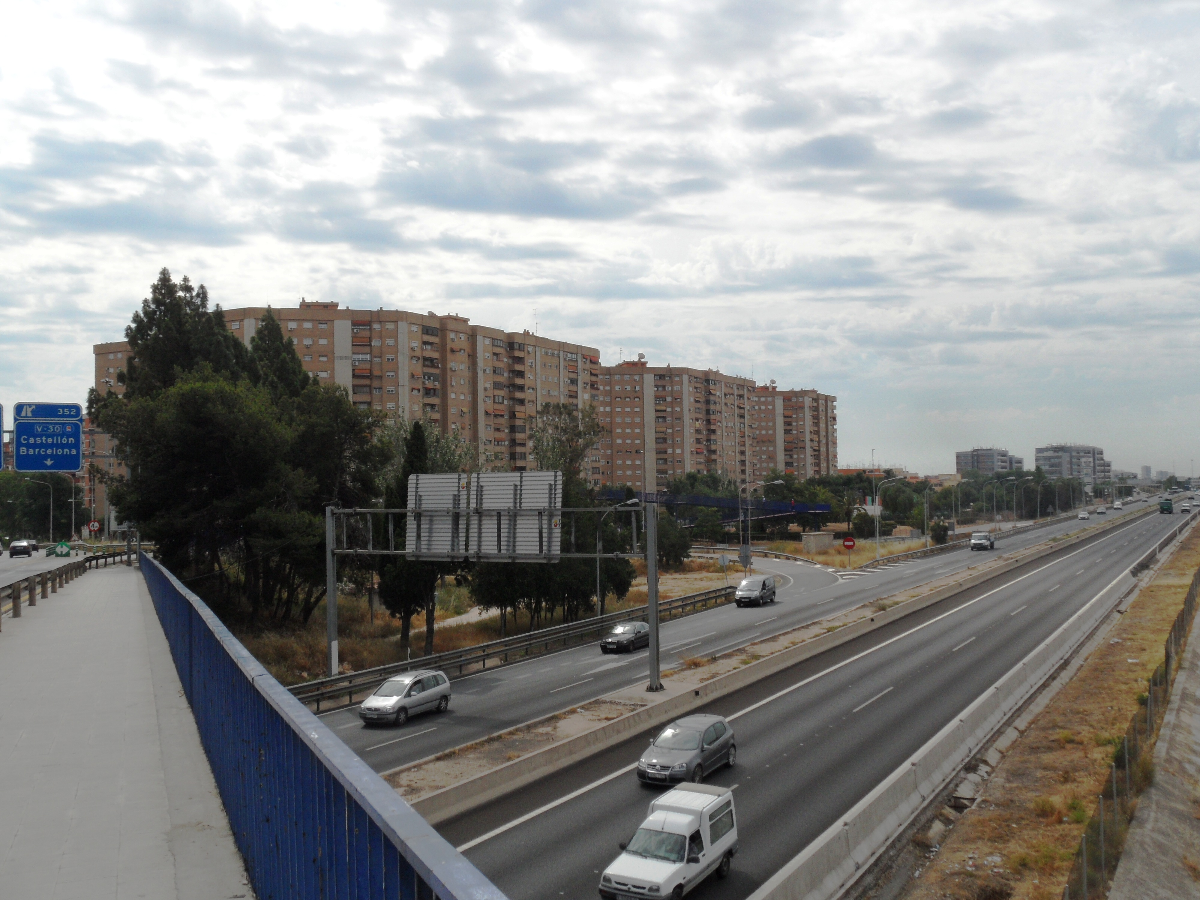 V-30 hacia el norte desde el Puente de Chirivella, y barrio de la Llum.